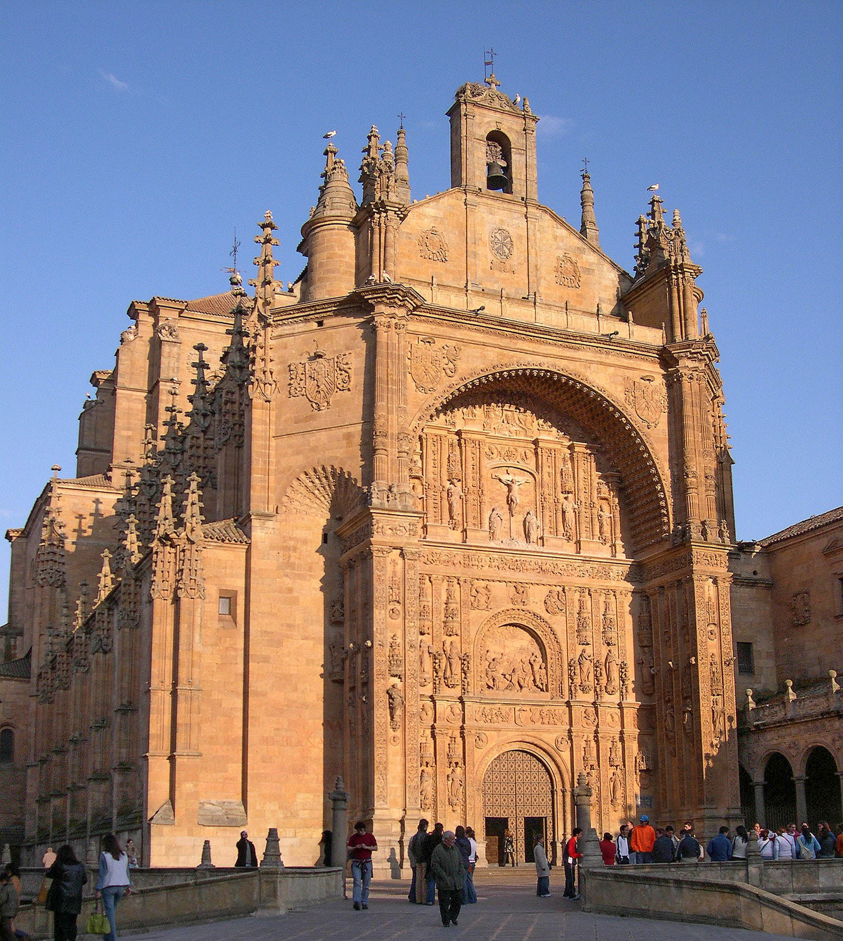 Iglesia del convento de San Esteban, en Salamanca (España).